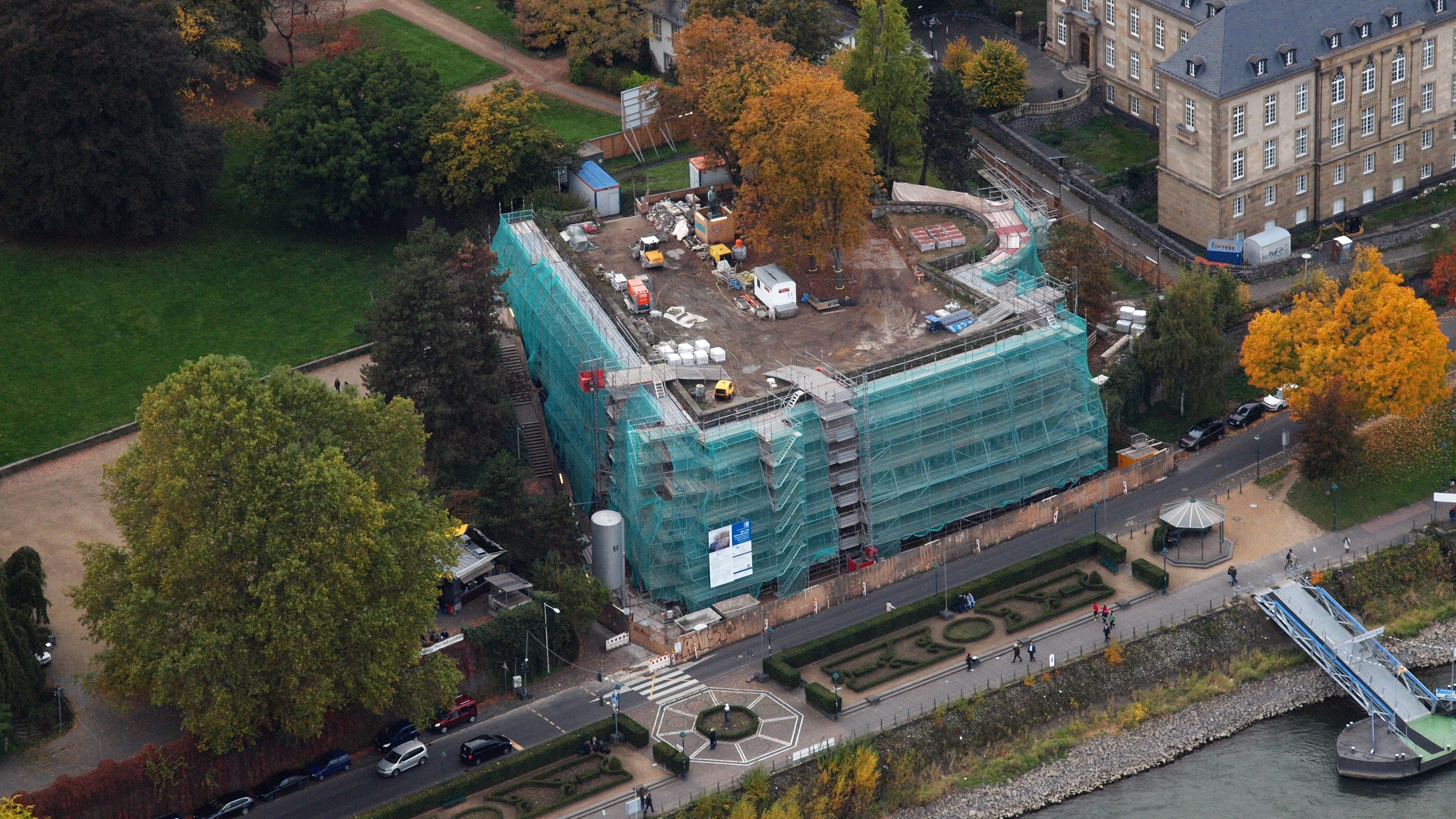 Alter Zoll, Bonn: Luftaufnahme während der Sanierung 2015–17